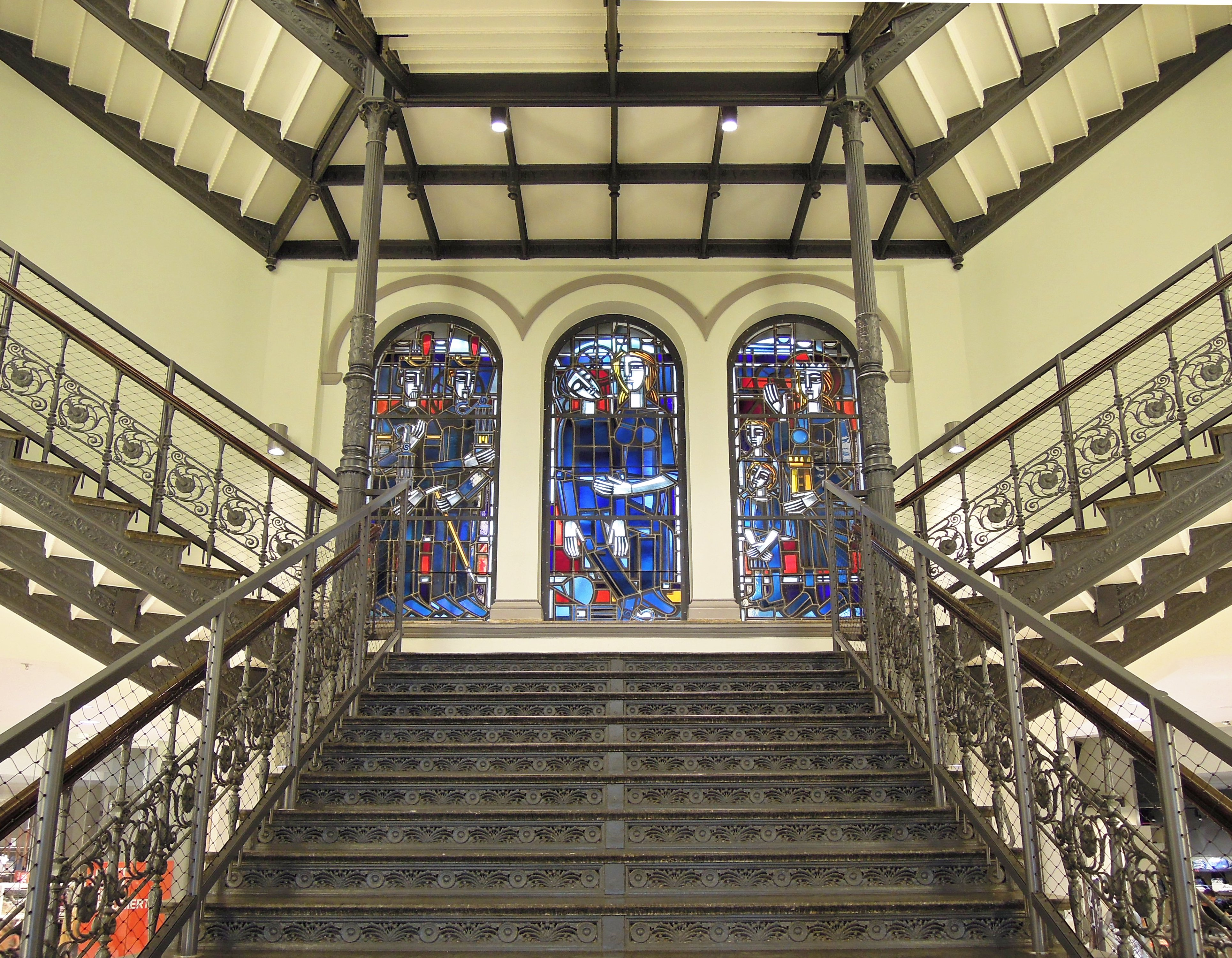 Treppenhaus. Die Fenster sind von Ferdinand Selgrad entworfen.